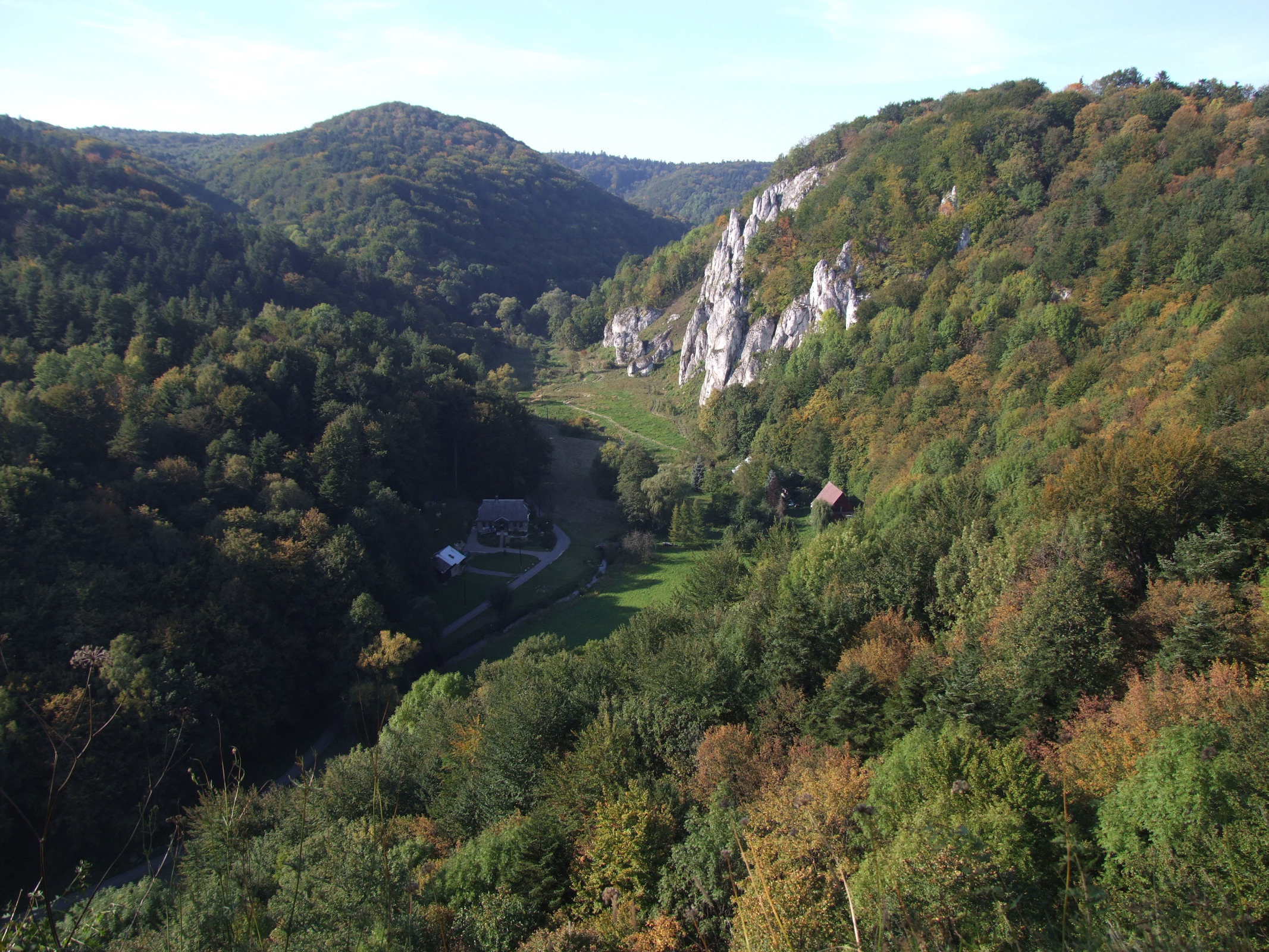 Dolina Prądnika (Ojcowski Park Narodowy)